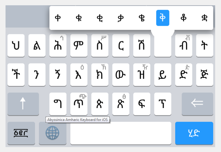 Амхарская клавиатура